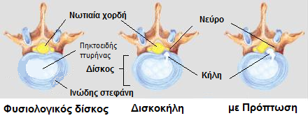 Στάδια εξέλιξης δισκοκήλης